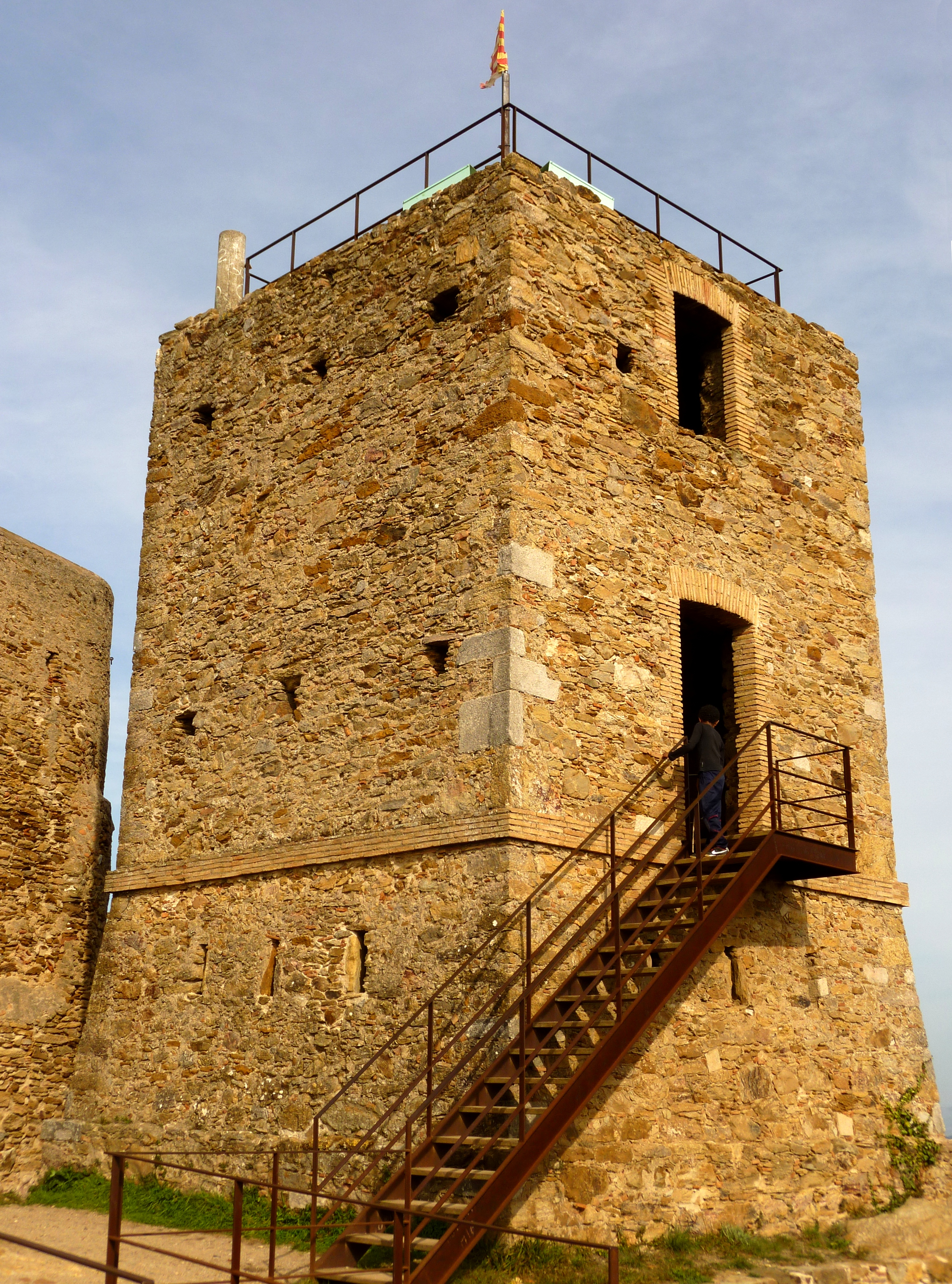 Imatge des de la banda sud-oest de la torre del telègraf òptic del Castell de Sant Miquel (a cavall entre els municipis de Girona i Celrà). Noteu la presència del tres pisos, així com el vèrtex geodèsic al cim de l'edifici. De fet no és un castell típic. La torre fou construïda a mitjans segle XIX com a part de la línia de telègraf òptic Madrid-frontera francesa